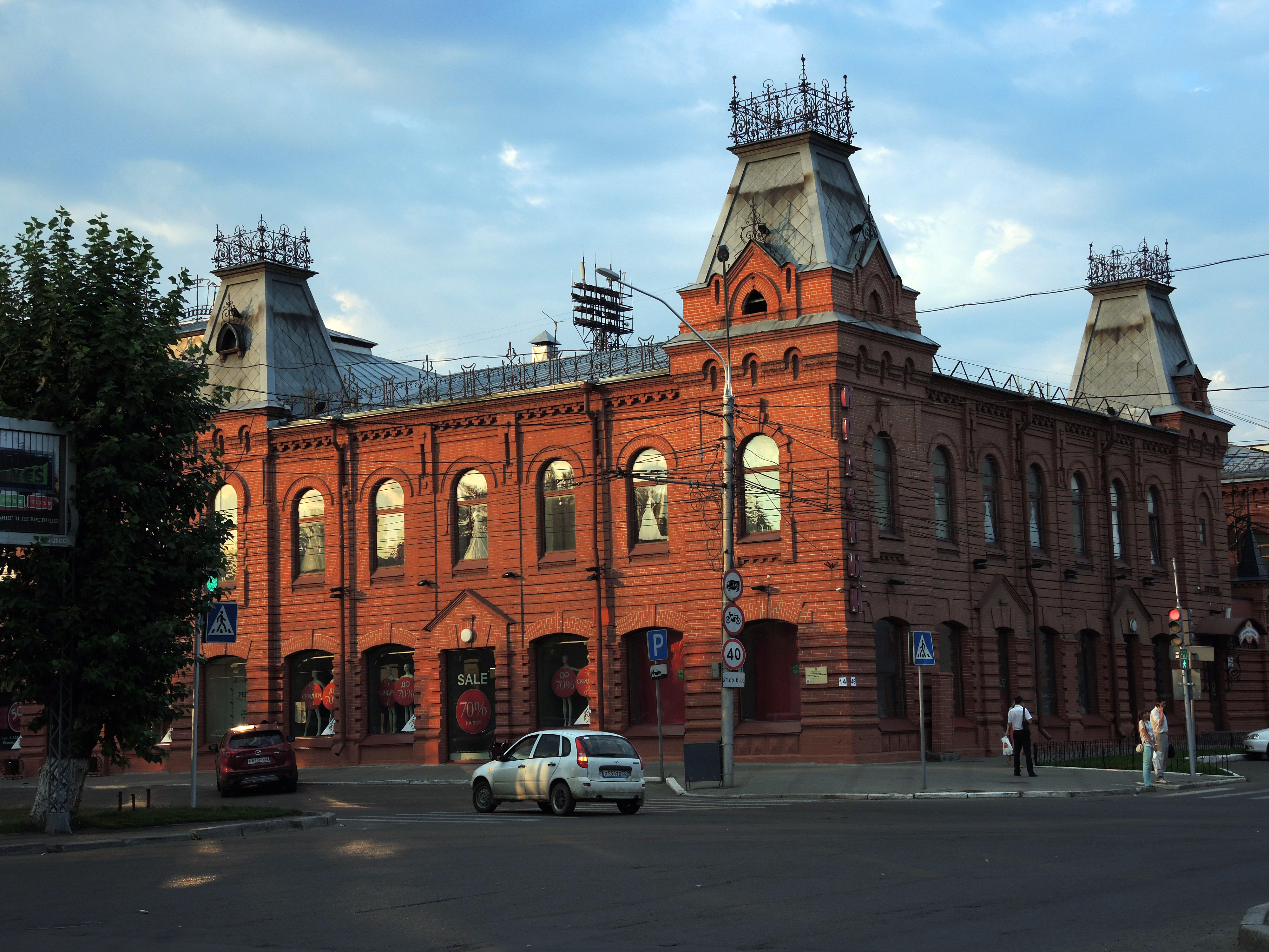 Торговый дом Полякова: улица Гоголя, 46 (проспект Ленина, 14), Барнаул, Алтайский край